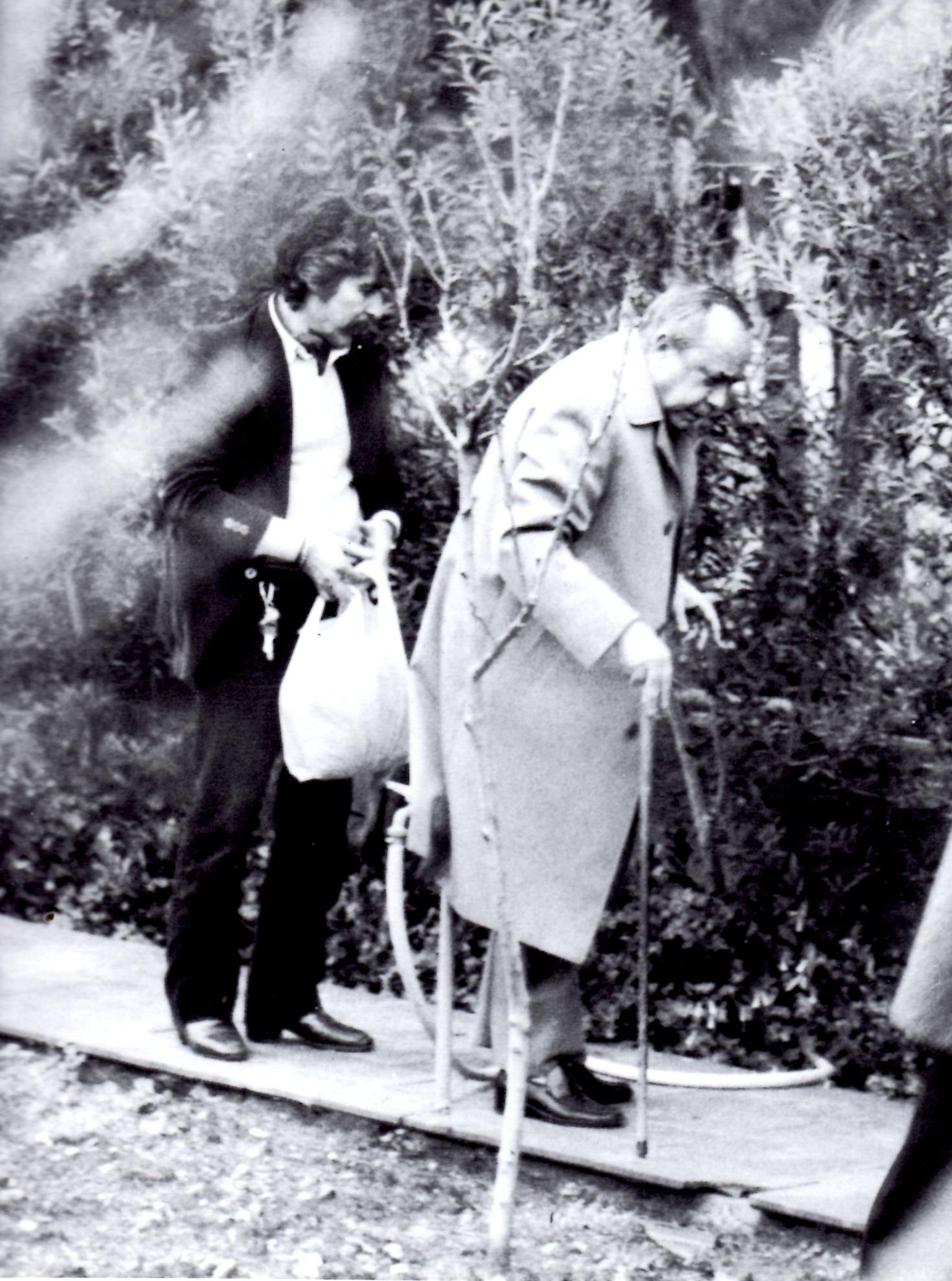 L'artista e lo scrittore in cerca di asparagi